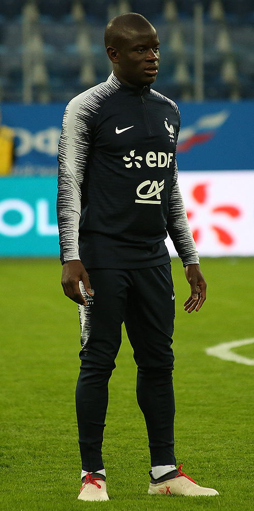 Звёзды сборной Франции готовятся к матчу с Россией